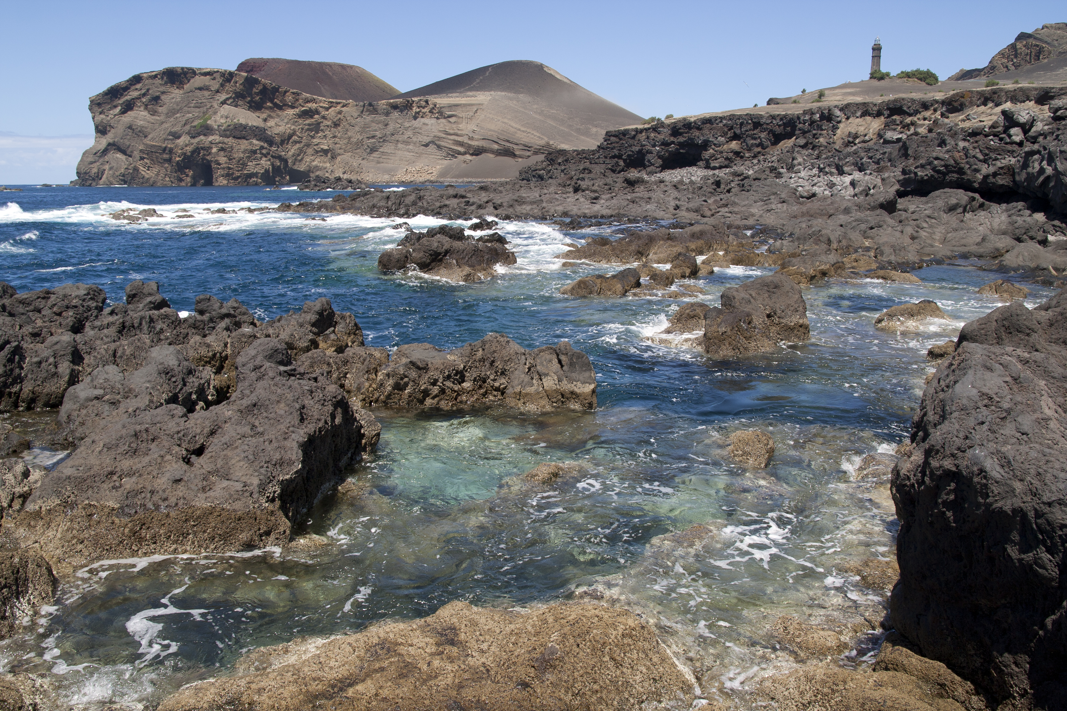 Faial